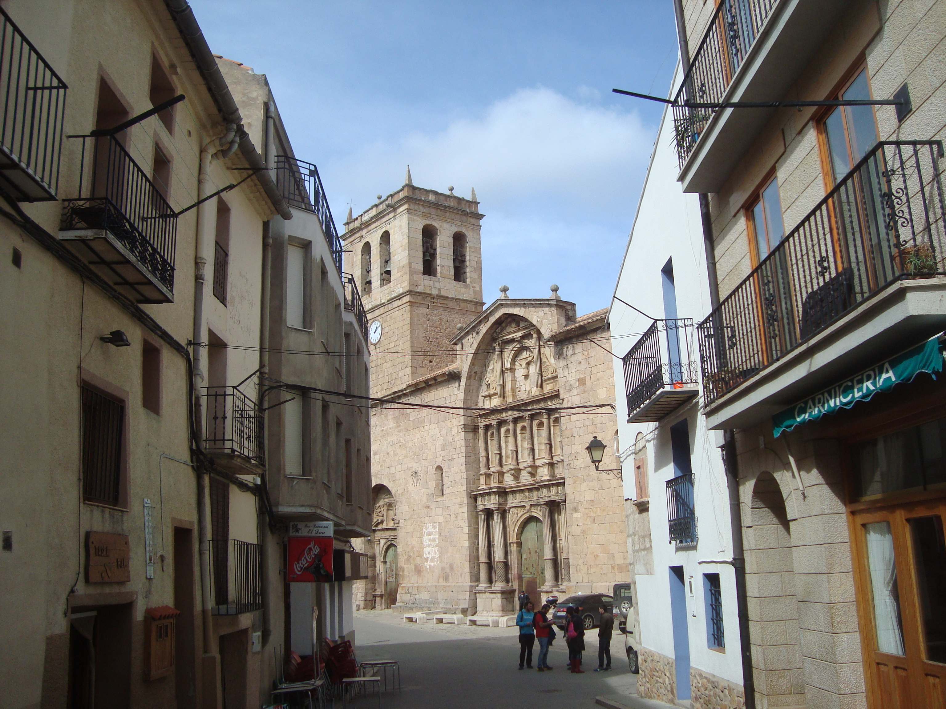 Vistabella del Maestrazgo